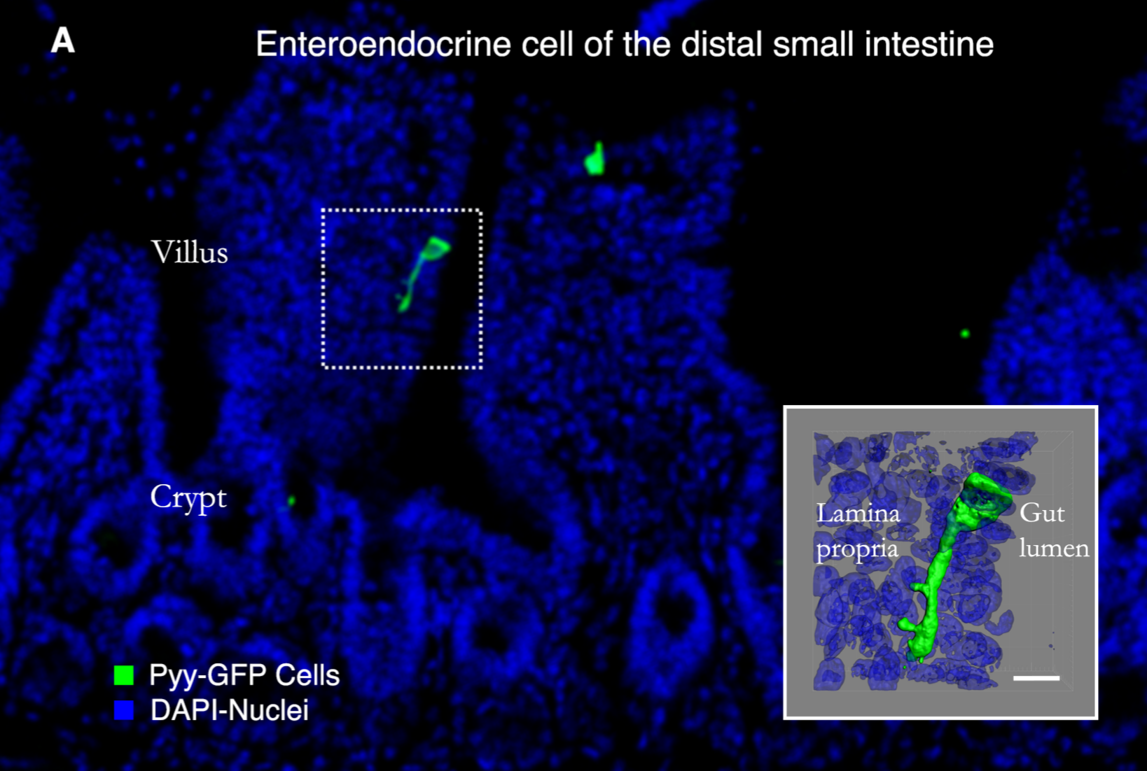 Figura 1. Microscopía electrónica de barrido en serie (SBEM) en bloque de una célula quimiosensorial intestinal específica. A. Célula enteroendocrina en el íleon de un ratón transgénico Pyy-GFP. El recuadro muestra una reconstrucción de una pila z confocal de la región punteada.